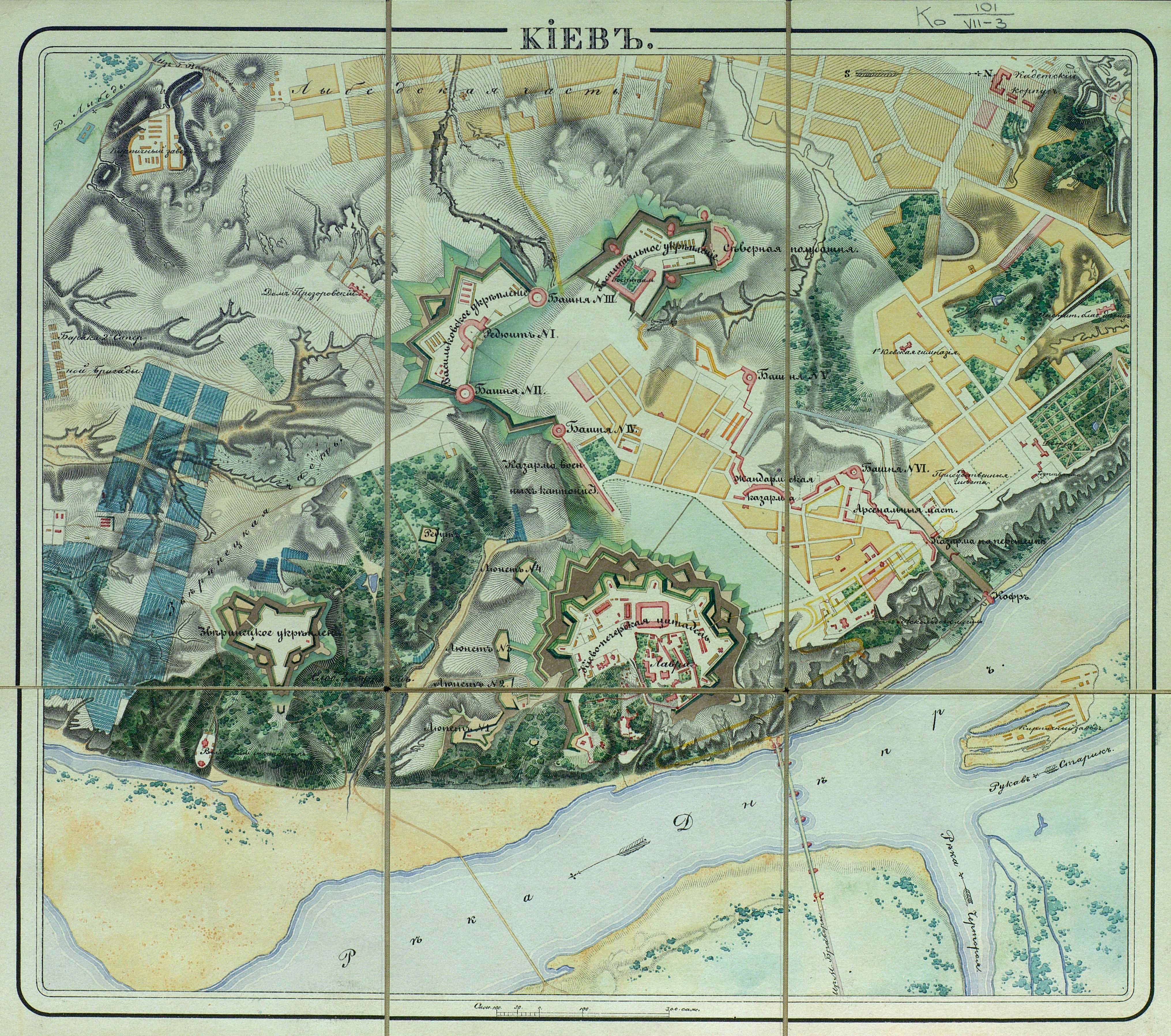 Киев.